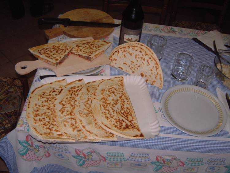 Je suis l'auteur de cette photo prise en avril 2007 à Macerone (commune de Cesena, Emilie-Romagne, Italie).